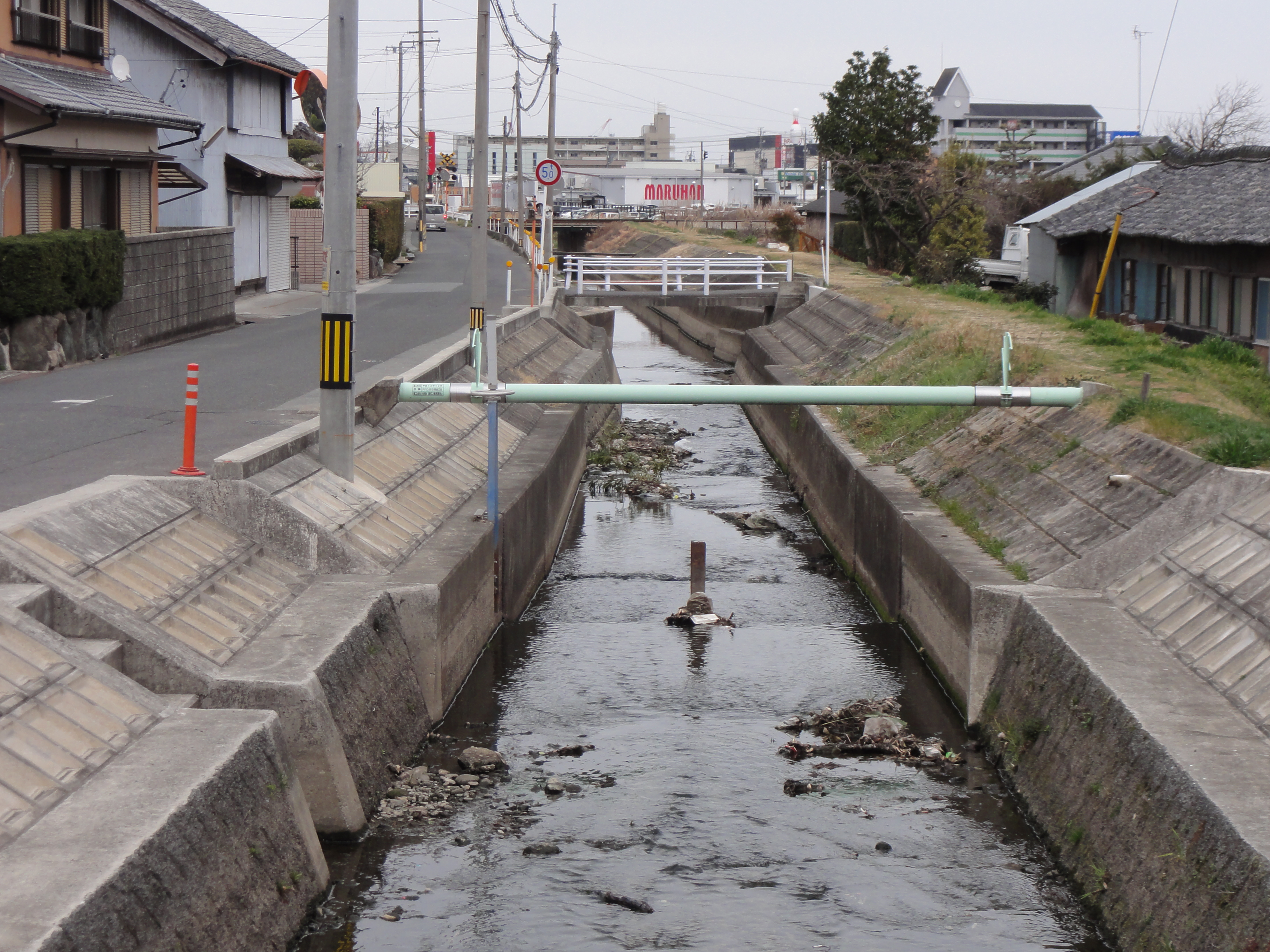 天神橋付近